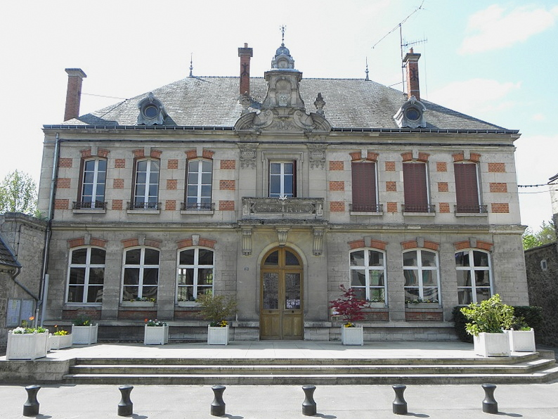 Mairie de La Ferté-Milon (02).